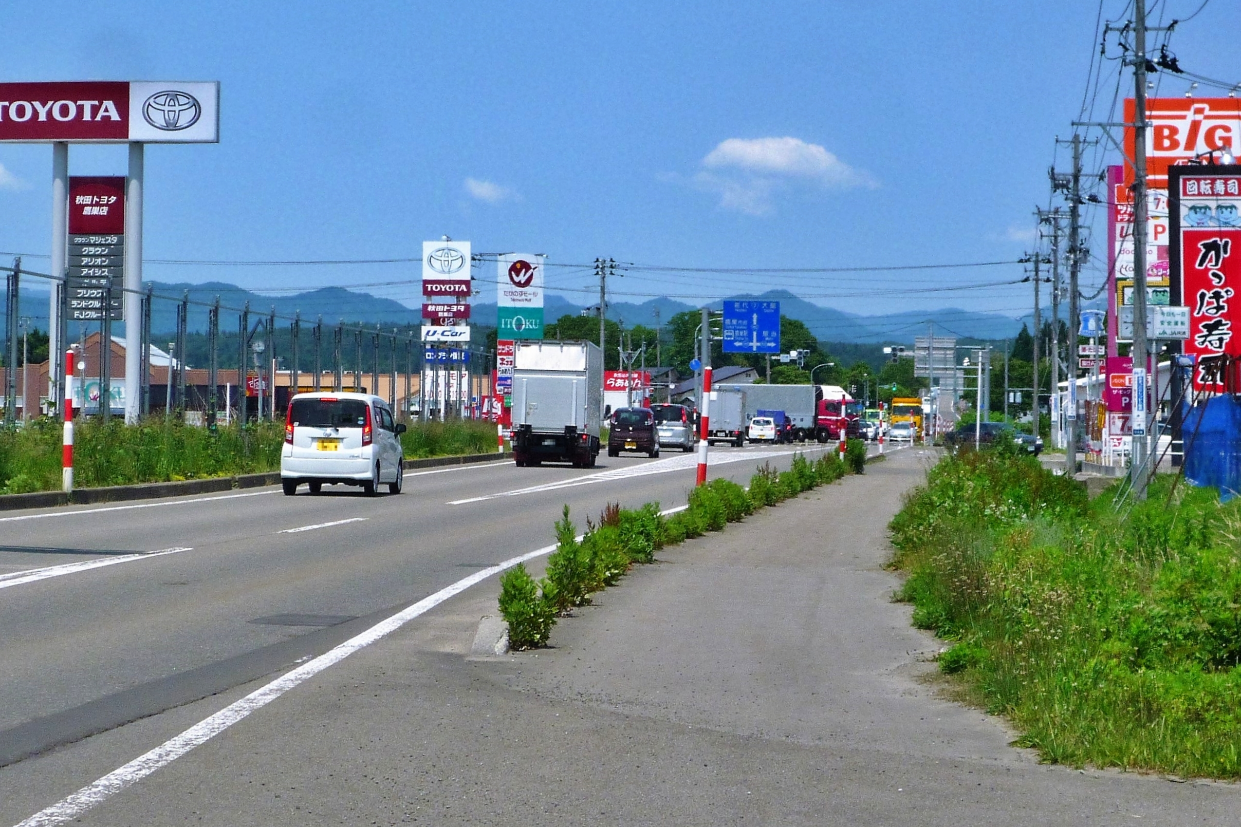 国道105号 鷹巣バイパス 中綱交差点